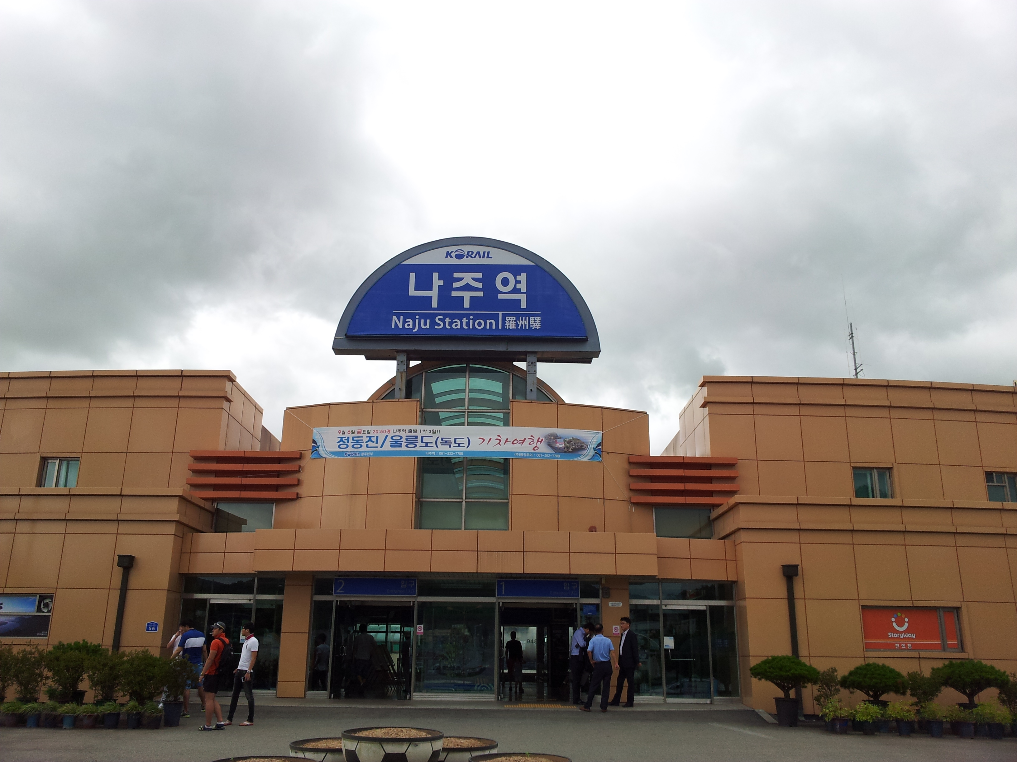 나주역